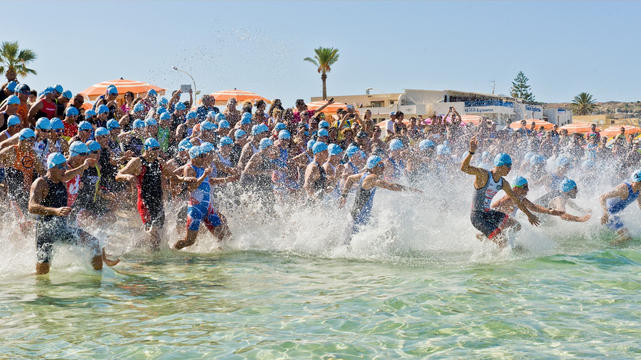 Il triathlon è uno sport multidisciplinare individuale. Dal 2000 è specialità olimpica maschile e femminile. È articolato su tre prove che si svolgono in immediata successione e sono – sia pure basate su diverse distanze a seconda della categoria – comuni a tutti gli atleti: nuoto, ciclismo e corsa. _________________________ “Memorial Roberto Miceli” di Triathlon Sprint, manifestazione inserita nell’ambito del “San Vito October Trails”. Oltre 180 atleti provenienti da tutta Italia si sono cimentati nelle tre discipline previste: 750 metri di Nuoto nell’acqua cristallina della località turistica trapanese, 20 km di bici e 5 Km di corsa. _________________________